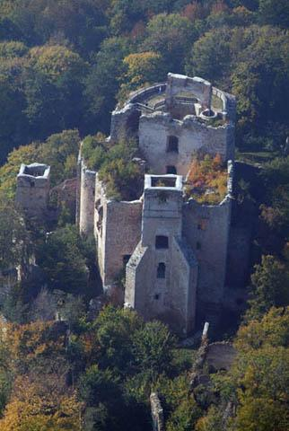 Landsee, Germany, aerialphotography. Vordergrund Kapellenturm, im Hintergrund des Zentralbaus der Donjon